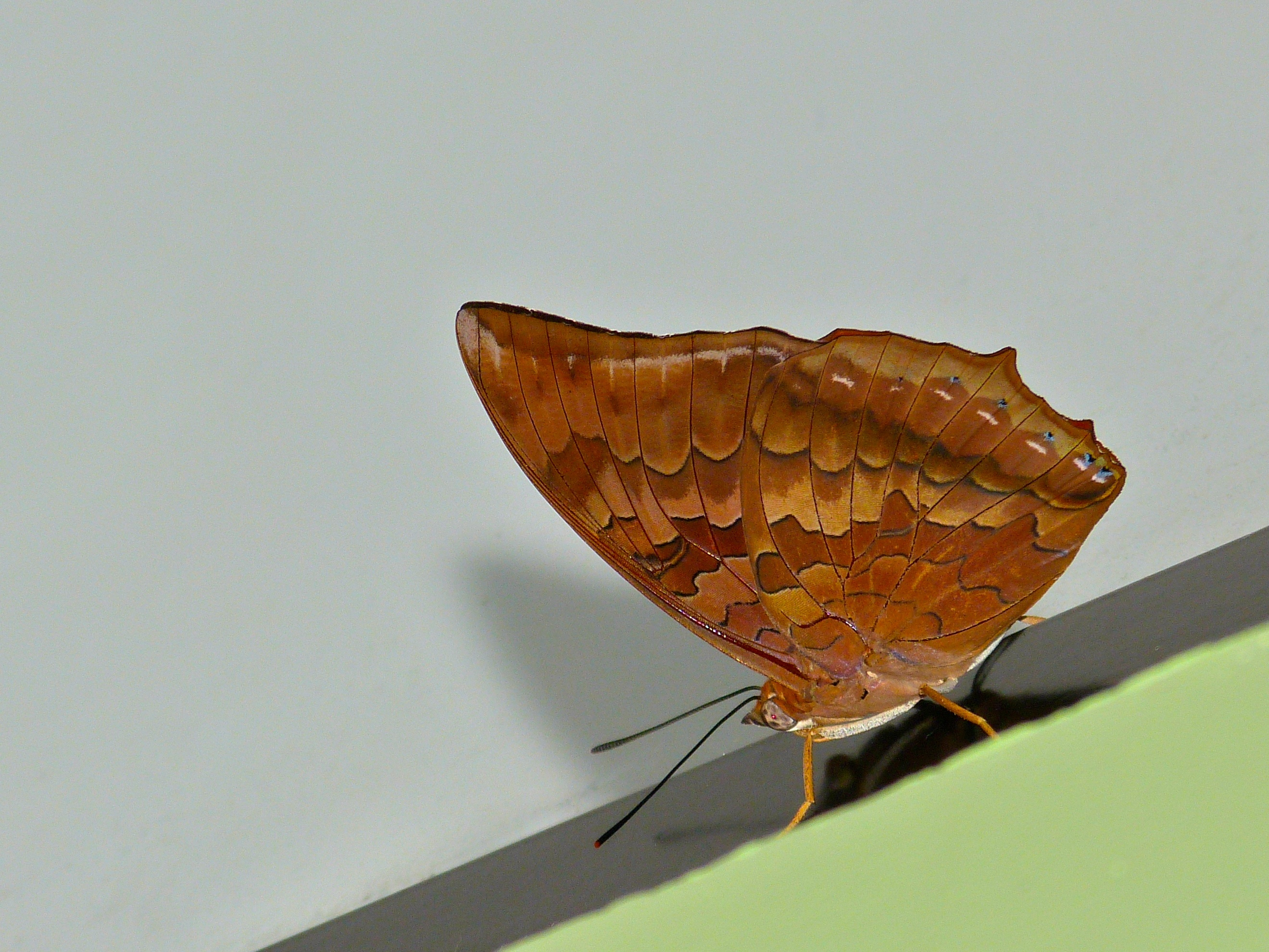 Gunung Mulu NP, Sarawak, MALAYSIA